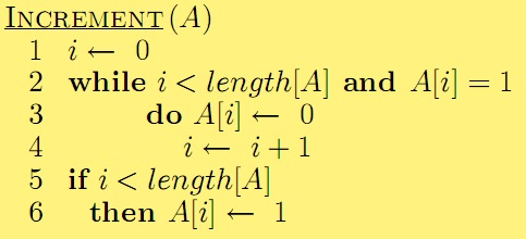 ی